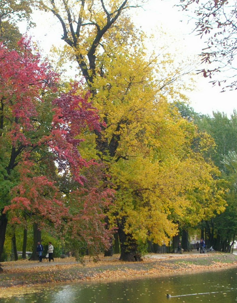 Starodrzew nad starym Kanałem Bydgoskim